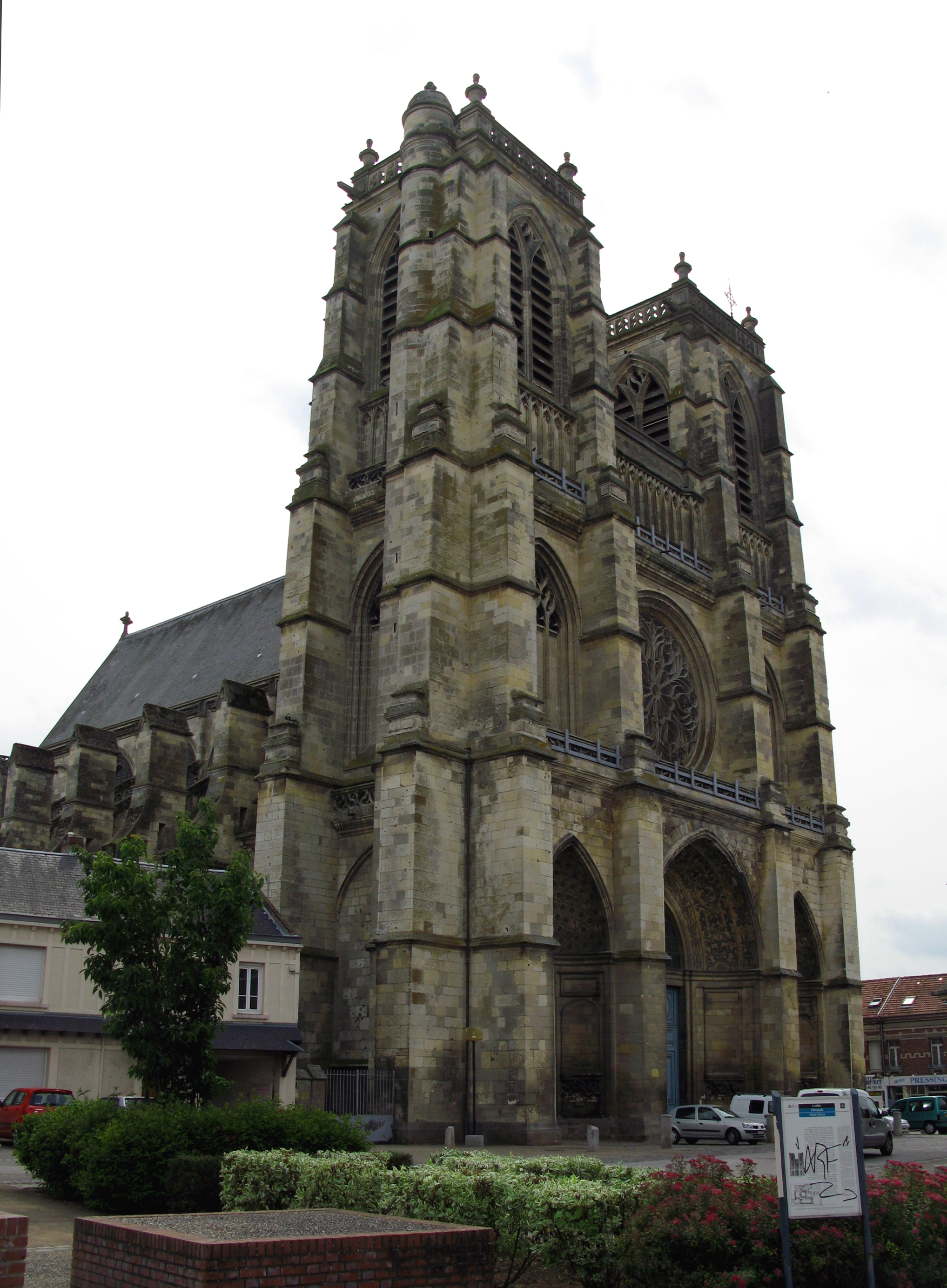 Corbie (Somme, France) - Abbatiale (Eglise St-Pierre). .